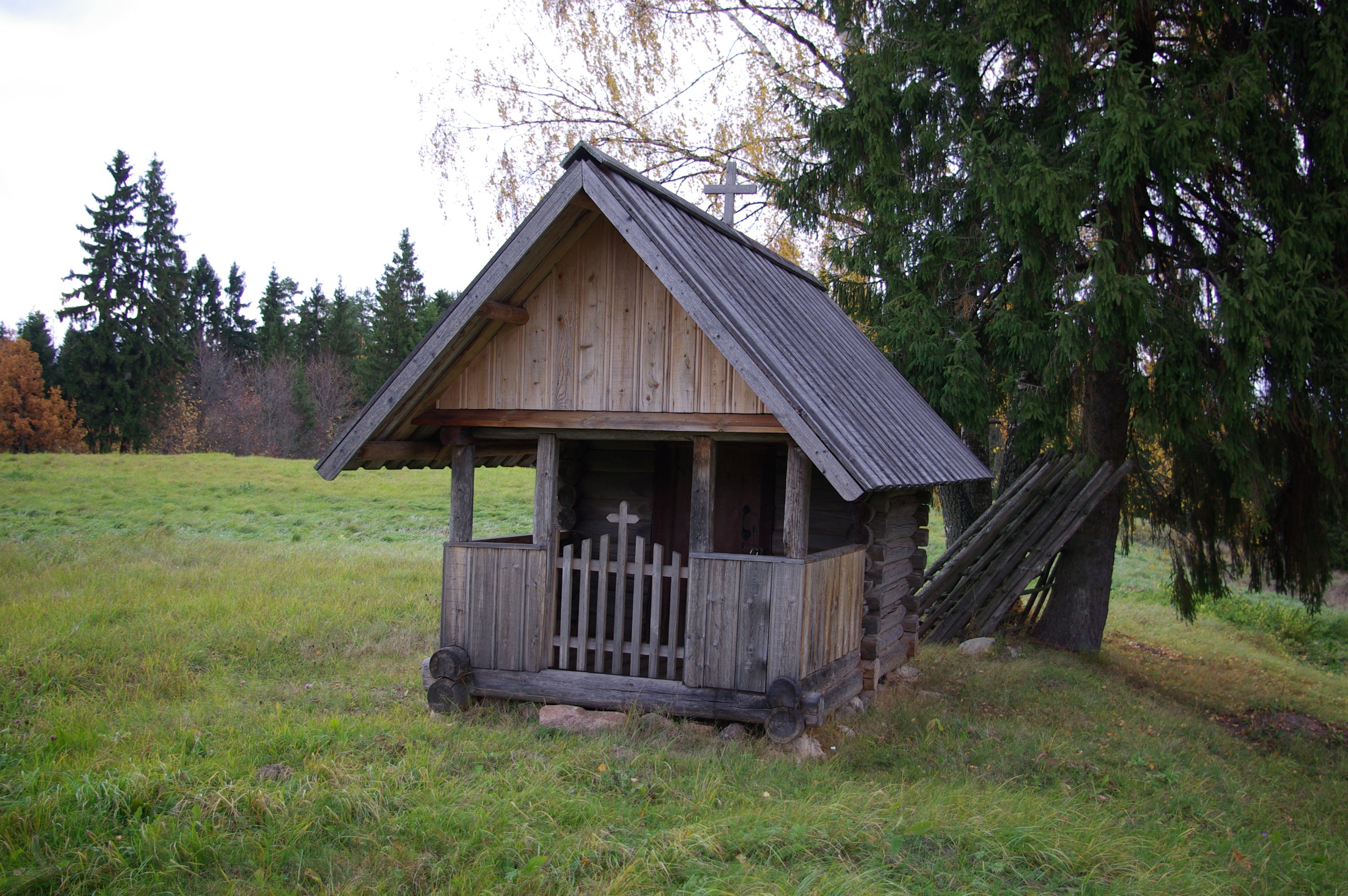 Rokina tsässon